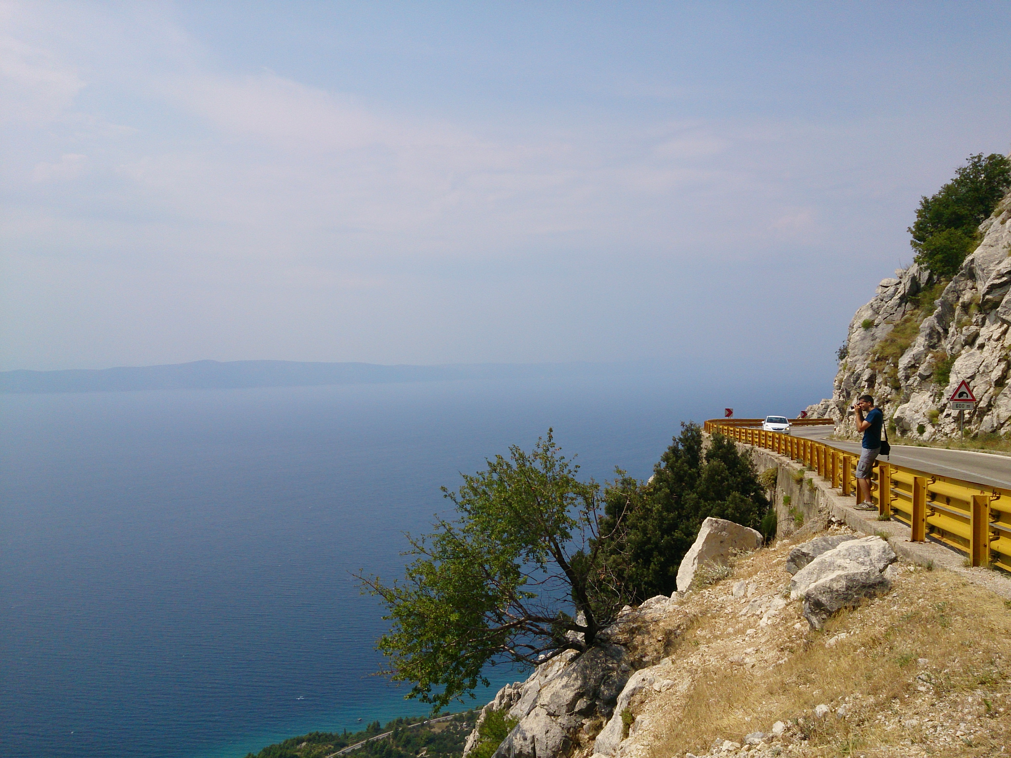 Panorámaút kilátás 5